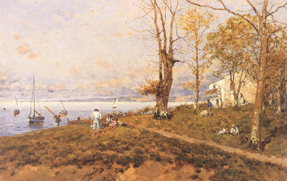 Paisaje con casas y barcos